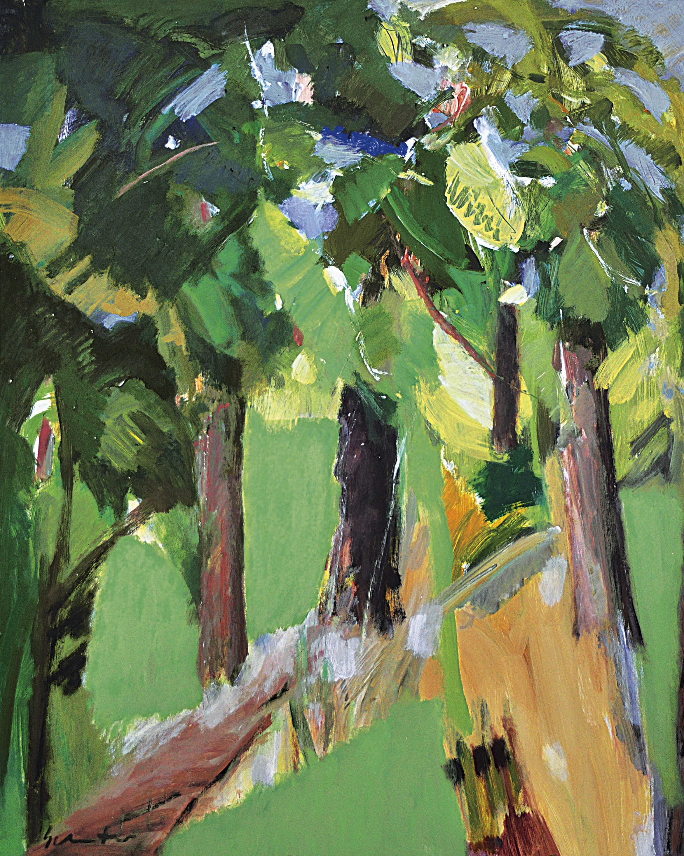 Bernhard Schnetzer, Allee, 100x80 Acryl, 1994